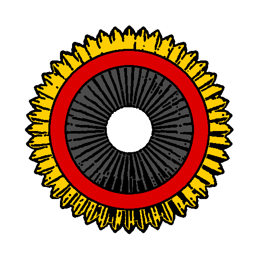 Kokarde Waldecks